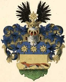 Wesseli (Blome) suguvõsa aadlivapp